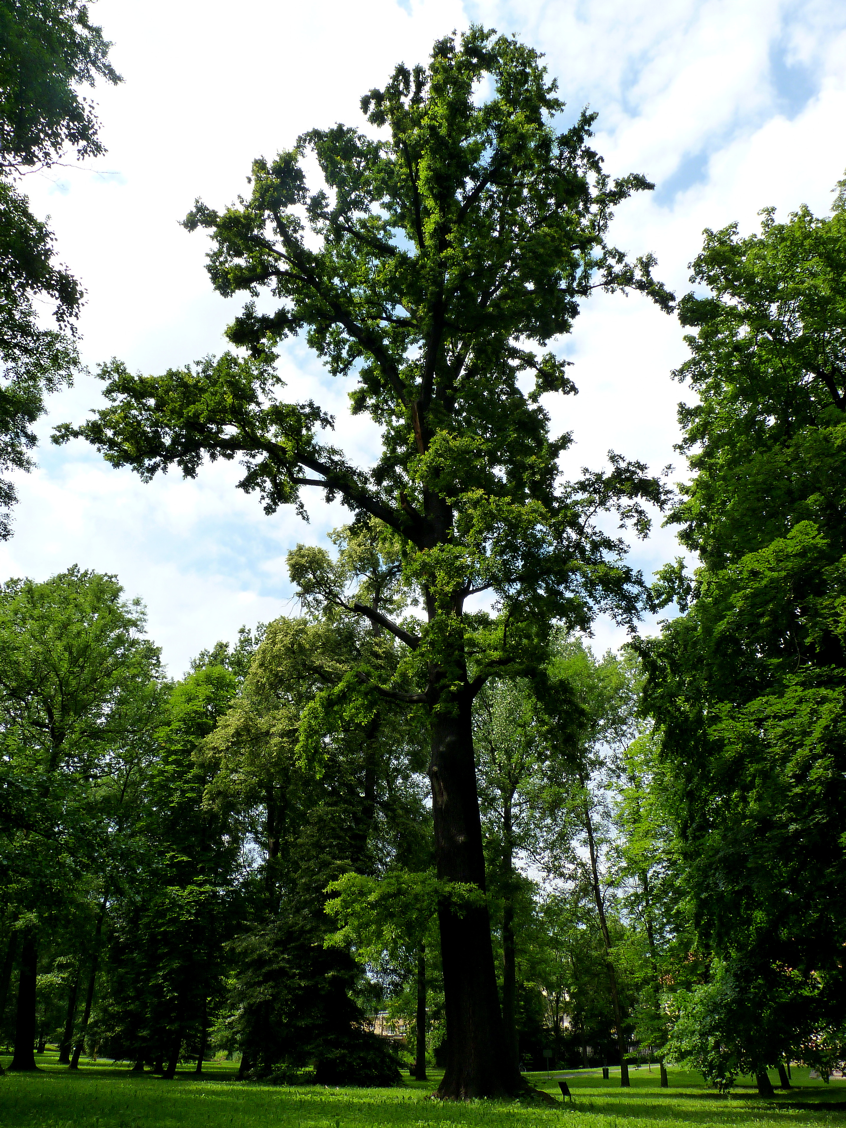 Dub v parku v Dolních Počernicích (2013).